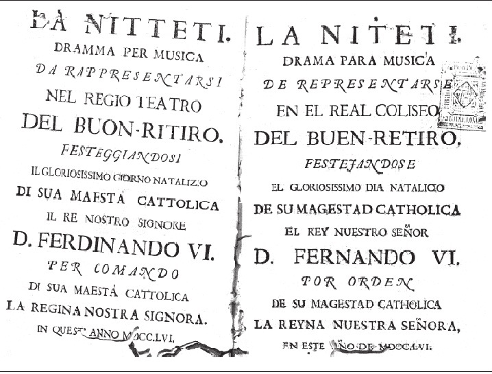 Portada del libreto original de la ópera Nitteti, con texto de Pietro Metastasio y música de Nicola Conforto (1718–1793). Madrid 1756